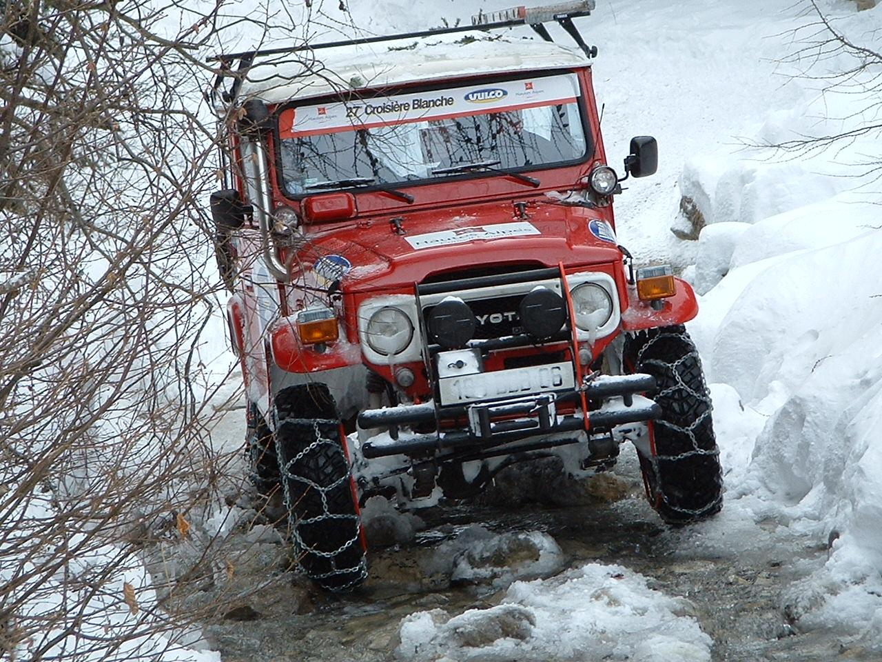 Toyota BJ 40 rouge à la Croisière Blanche 2004